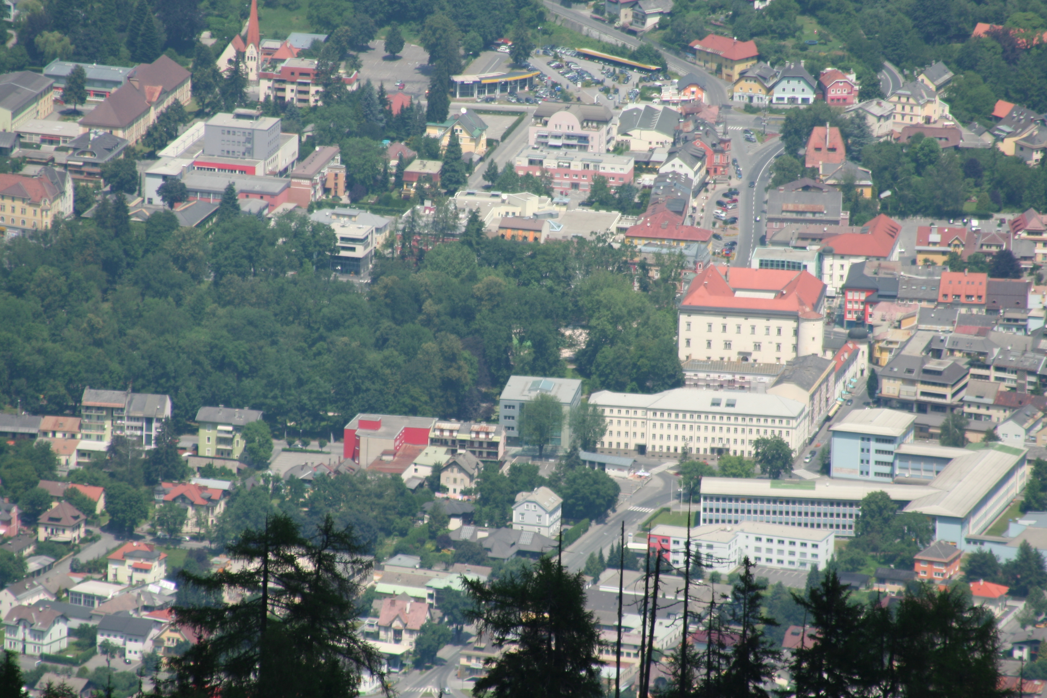 Spittal vom Goldeck aus